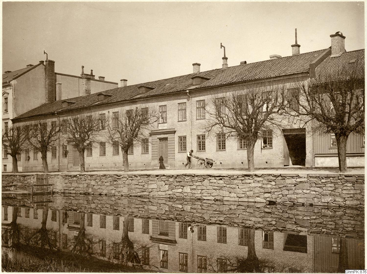 Willinska fattigfriskolan vid Stampgatan. Skolan startade 1767 efter initiativ av prästen Johan Willin. Han kom att få donatiioner från flera tongivande personer i staden, Carl Gustaf Bruzewitz, Martin Holterman, Anders Lesse, Gustav Bernahard Santesson med flera.